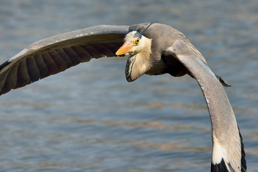 Exemple d'autofocus prédictif